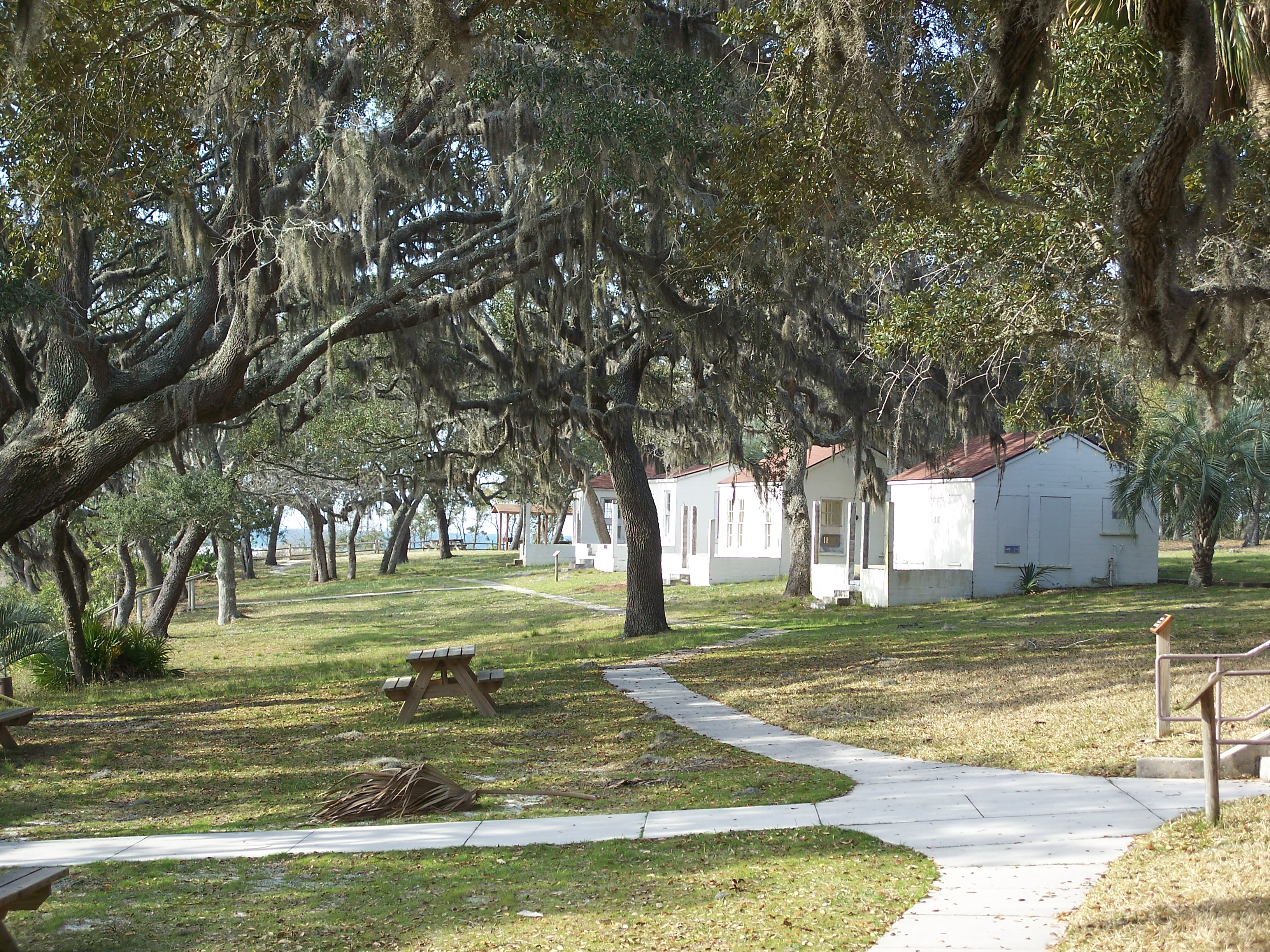 Cabins in Camp Helen State Park.